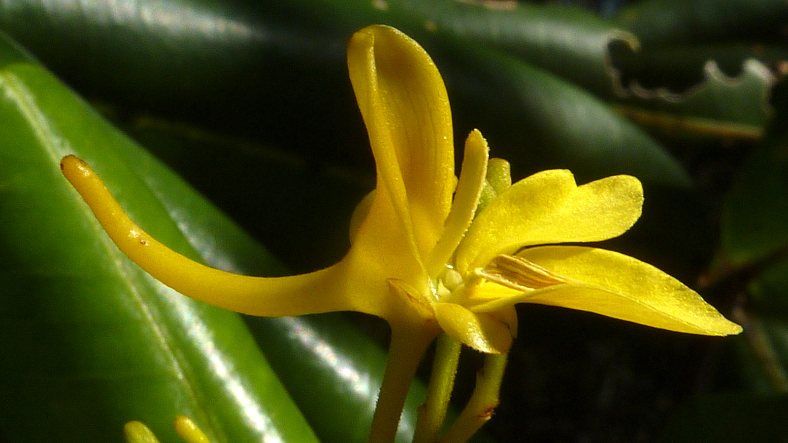 Vochysia lucida C. Presl